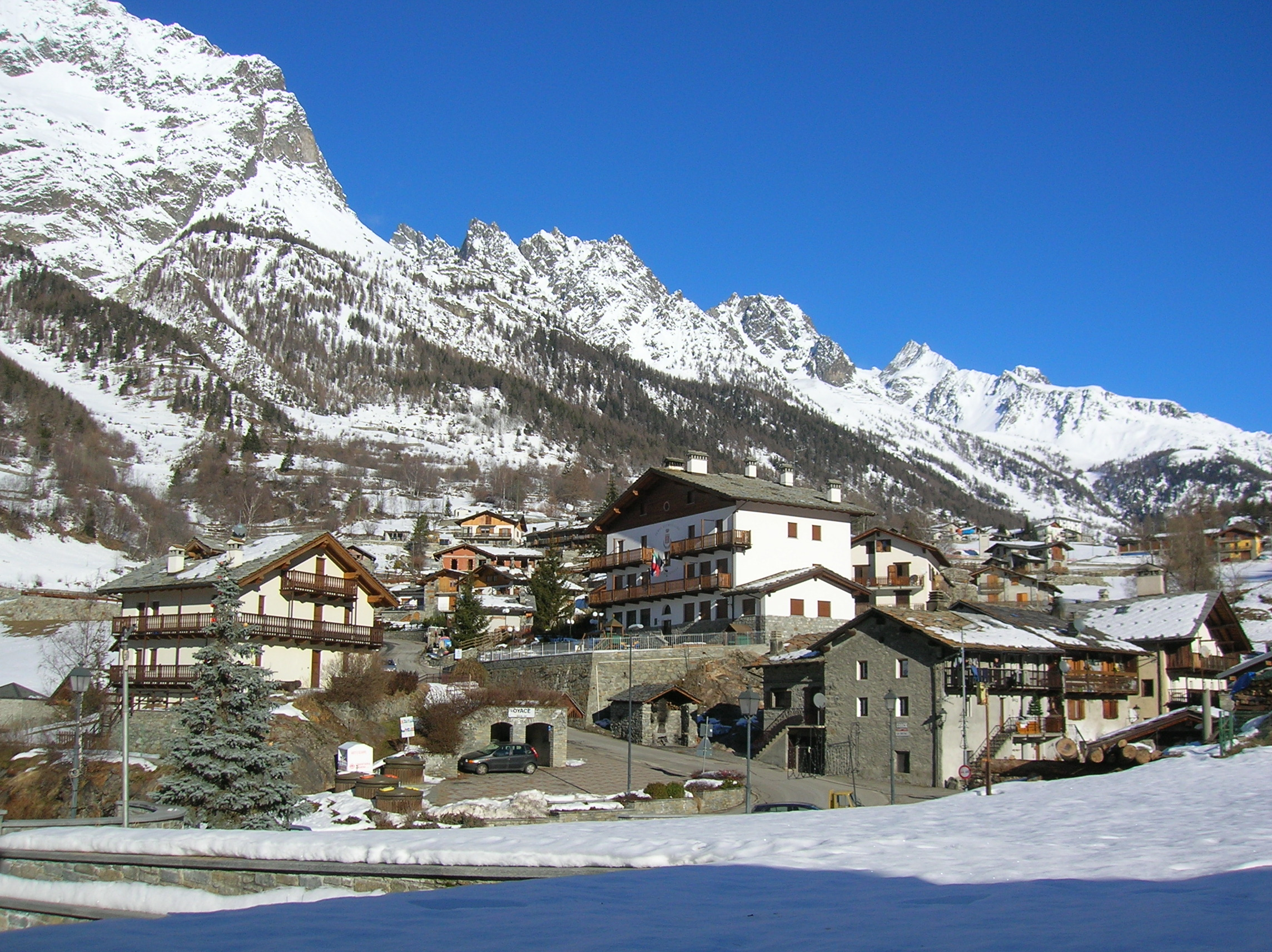 Oyace, Valle d'Aosta, Italia.